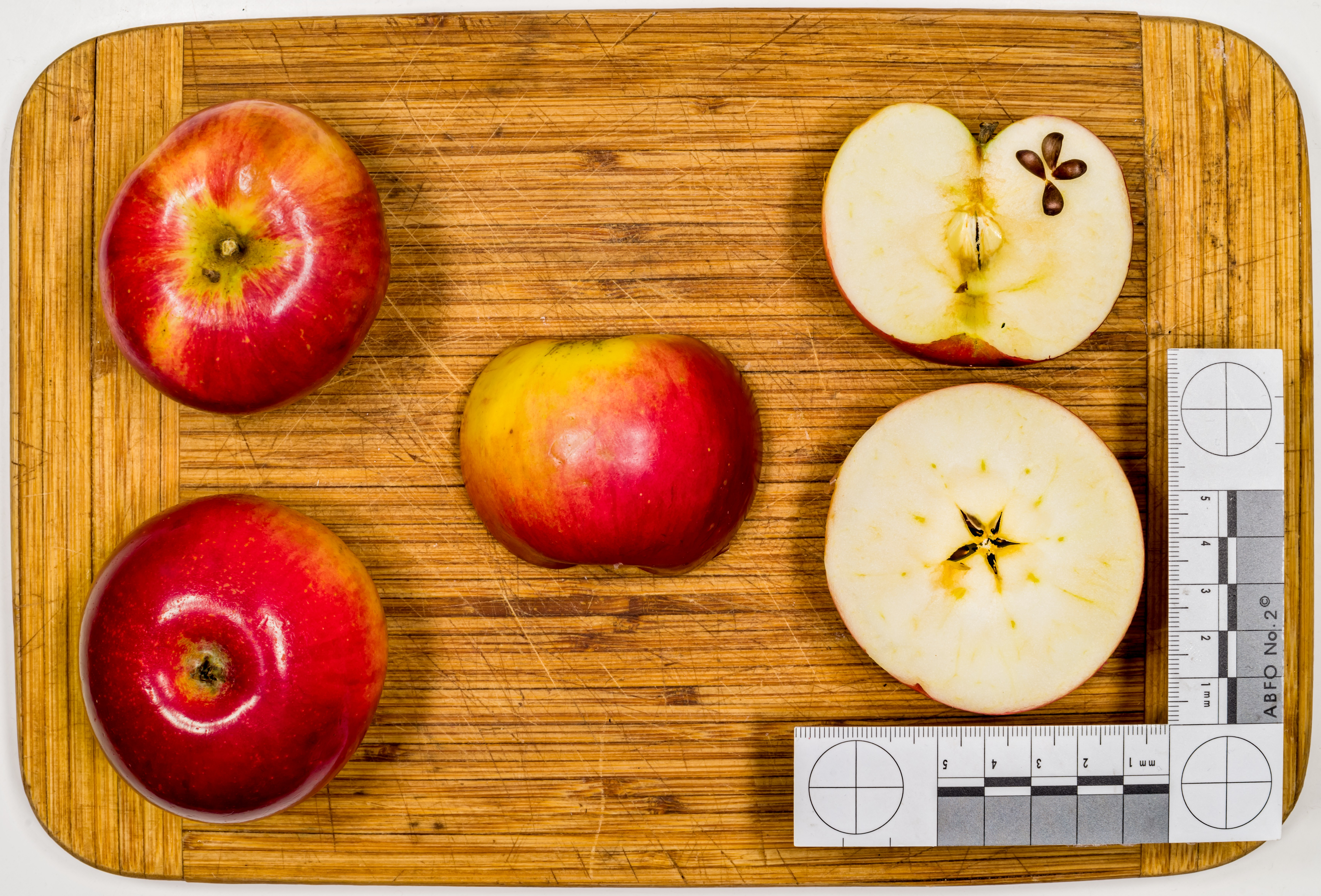 Apfelsorte: Akane, 'Prime Rouge, Primrouge Die Frucht ist klein und kugelförmig. Sie ist leuchtend rot gefärbt. Der Geschmack ist mild-säuerlich. Reife: August bis Oktober.